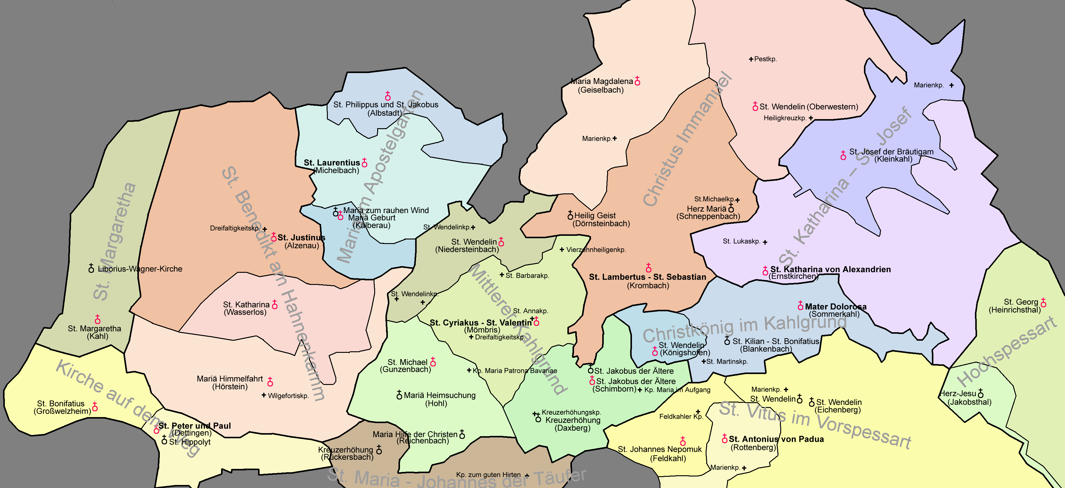 Katholische Gliederung des Kahlgrundes Fläche einer Pfarrei/Kuratie Grenze einer Pfarrei/Kuratie Filialkirche Pfarrkirche Vitus Name der Pfarrgemeinschaft Mater Verwaltungssitz der Pfarrgemeinschaft (Fettschrift) Grenze einer Pfarrgemeinschaft Kapelle